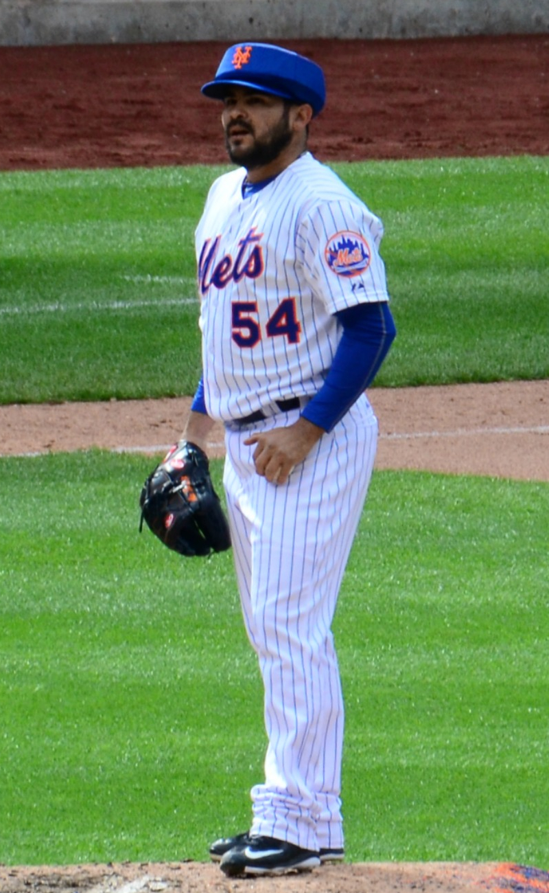 Alex Torres